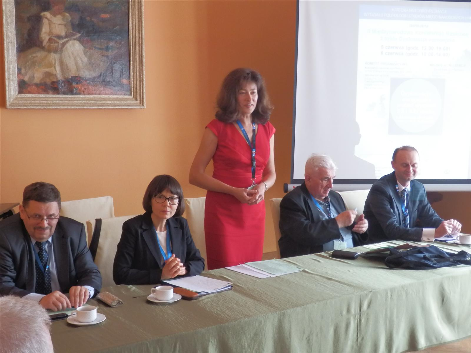 Konferencja naukowa